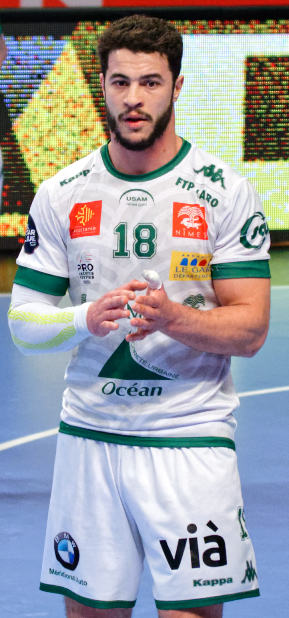 Rencontre de championnat entre le PSG et l'USAM Nîmes. A Coubertin, le 22 mars 2018.